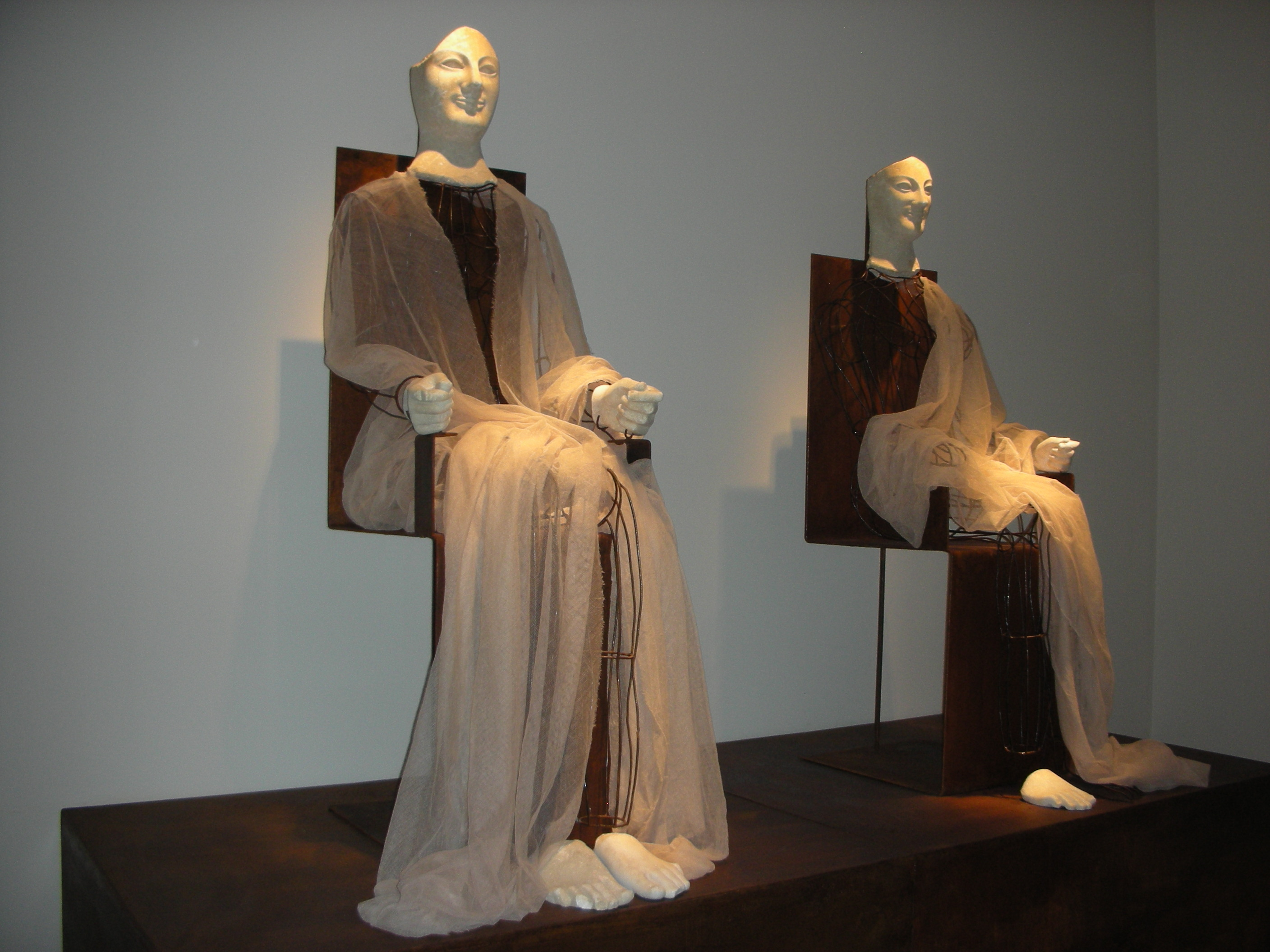 Aidone. Gli acroliti delle dee Demetra e Kore. Sono preziose sculture di epoca arcaica: teste, mani e piedi che venivano, secondo la tecnica acrolitica, scolpite in materiali preziosi, come il marmo o l'avorio, e si univano a corpi in materiale più povero, legno, ceramica o pietra, che poi venivano vestiti. Qui la stilista Marella Ferrera ha cercato di interpretare l'essenza di questa tecnica.